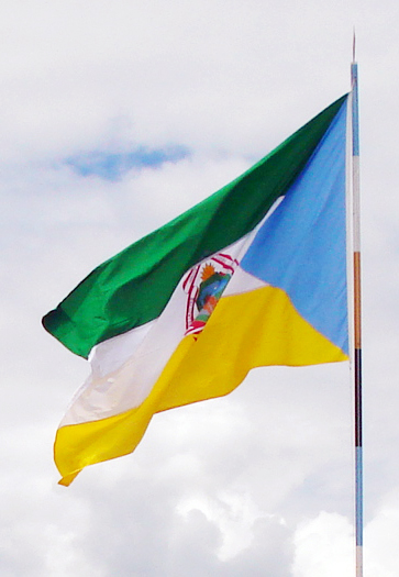 Bandera del Distrito de Elias Soplin Vargas